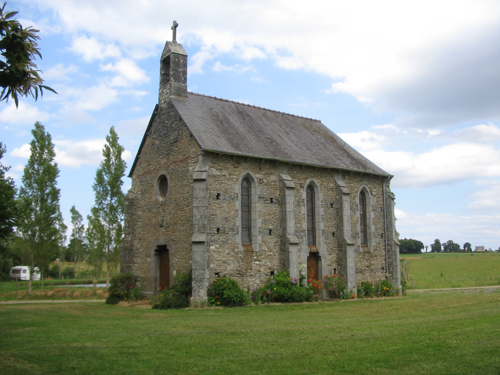 Chapelle Saint-Gilles-des-Prés à Langourla, Côtes d'Armor, France.